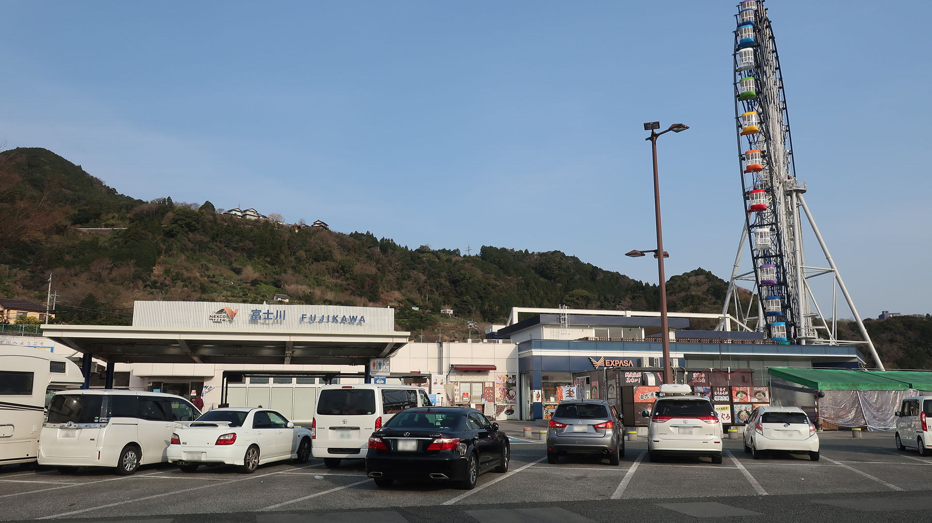 東名高速道路 富士川SA